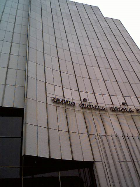 San Martín Cultural Center, façade. Buenos Aires.